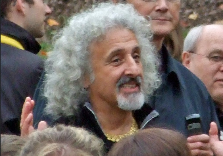 Mischa Maisky nach der Denkmalenthüllung für Mstislaw Rostropowitsch im „Schulgarten“ in Kronberg i.T.